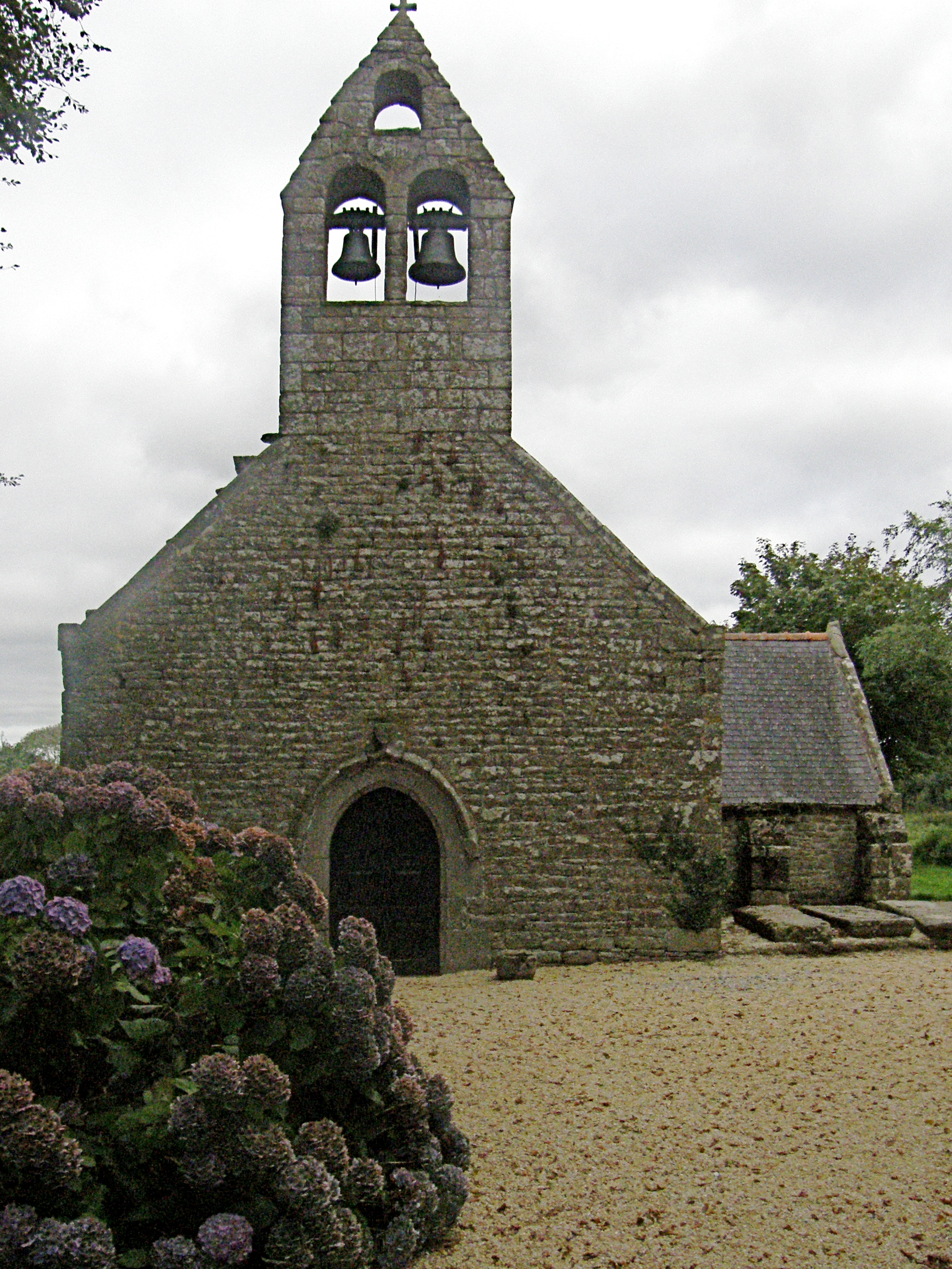 Le clocher de la chapelle Saint Léonard, église du bourg de Larret en PORSPODER.